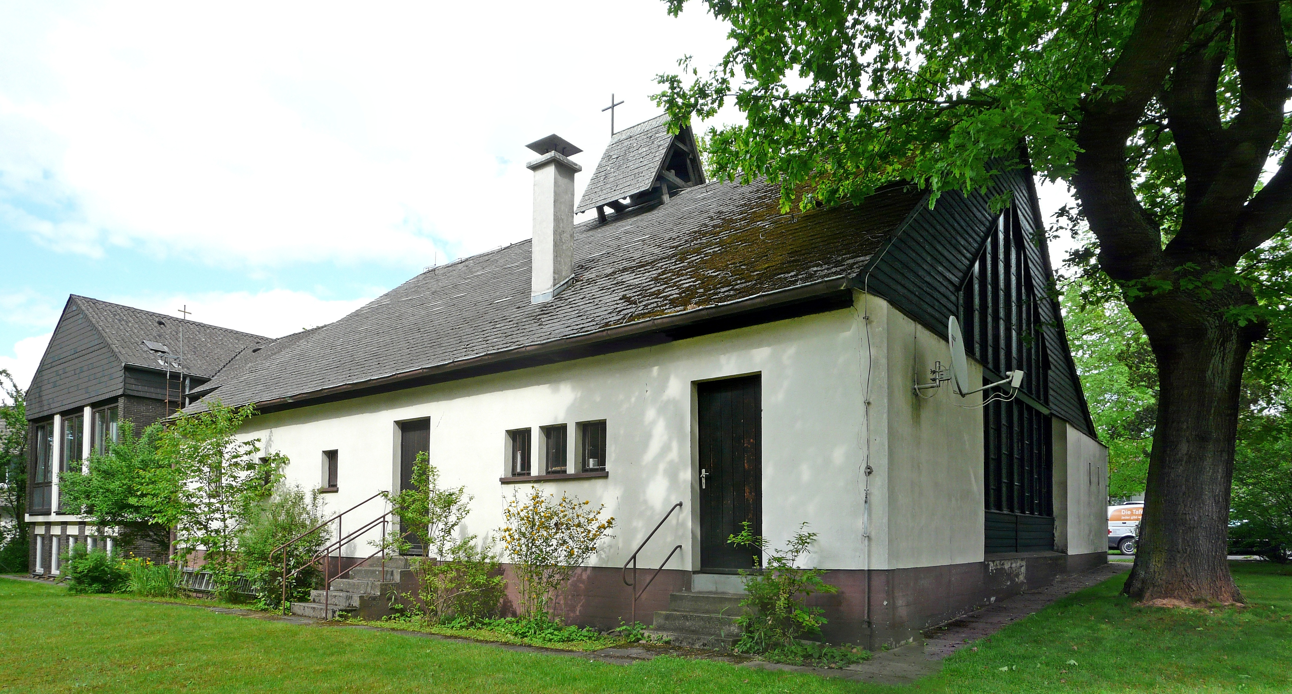 Die evangelische "Notkirche" in Stadtallendorf, eine Diasporakapelle von Otto Bartning, eingeweiht Dezember 1952. Gesehen von Südwesten.